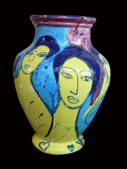 Coleção colorida